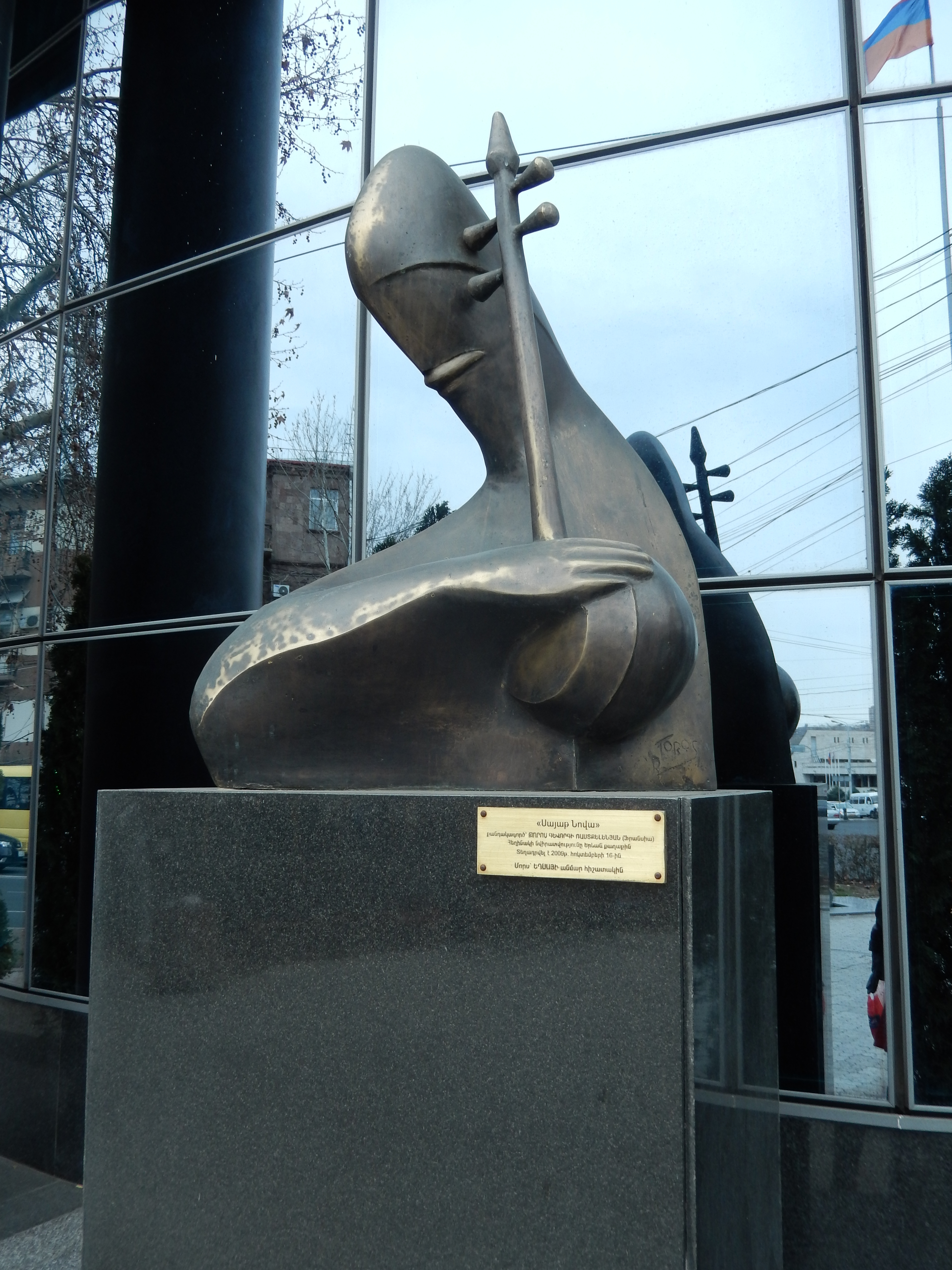 «Սայաթ-Նովայի» բրոնզաձույլ կիսանդրի